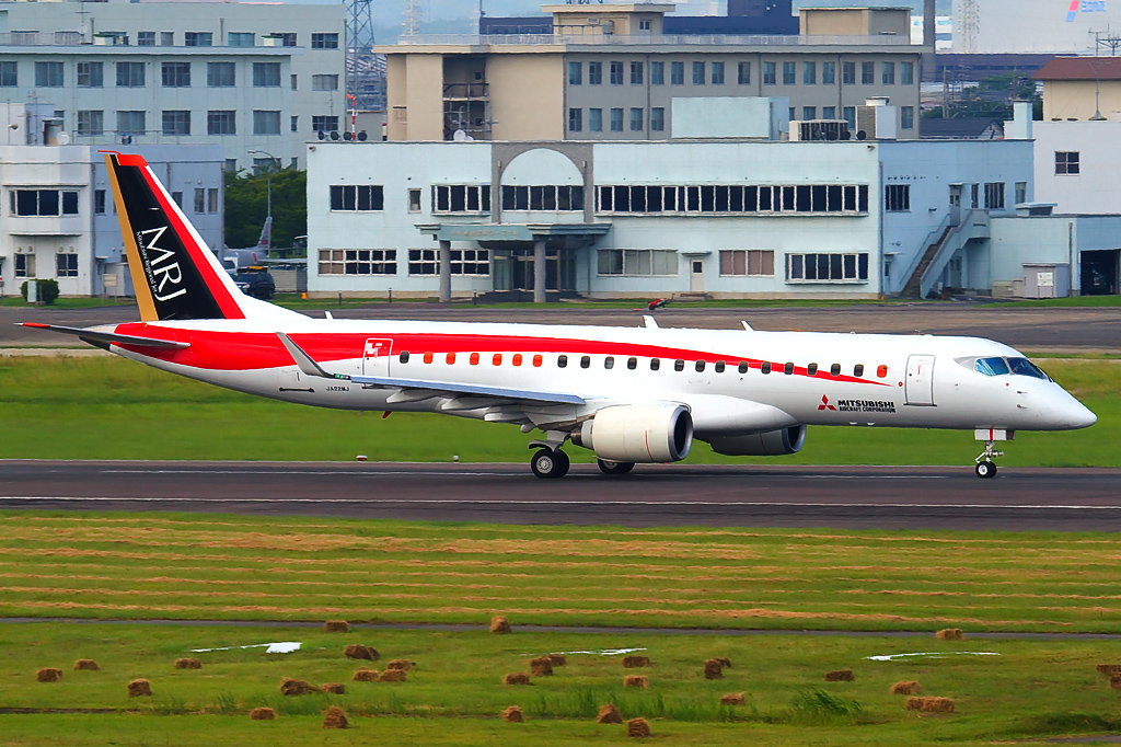 MRJ90飛行試験2号機